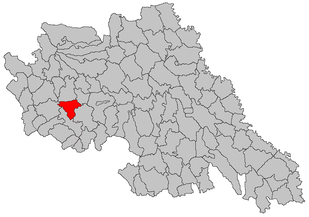 Categorie:Hărţi ale judeţului Iaşi